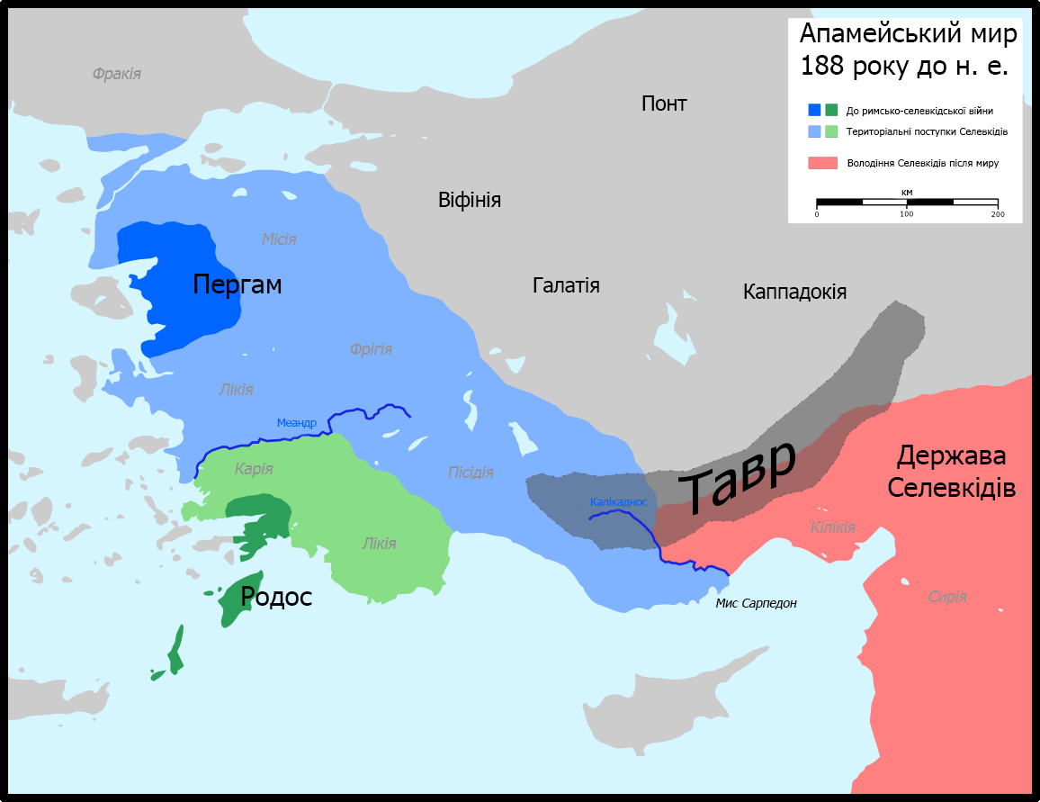 Територіальні поступки Селевкідів після укладення Апамейського мирного договору 188 року до н. е.